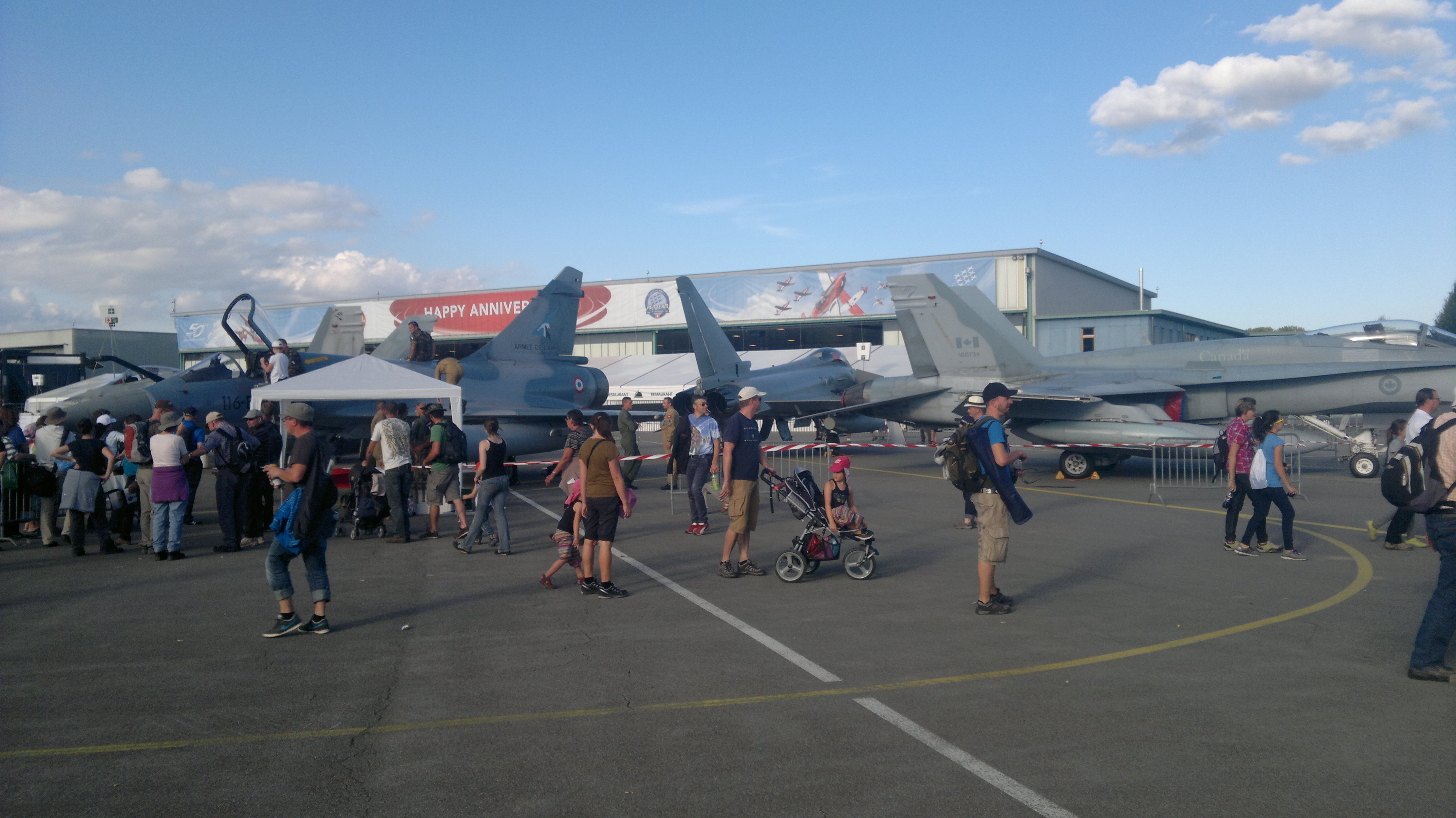 Payerne Air14